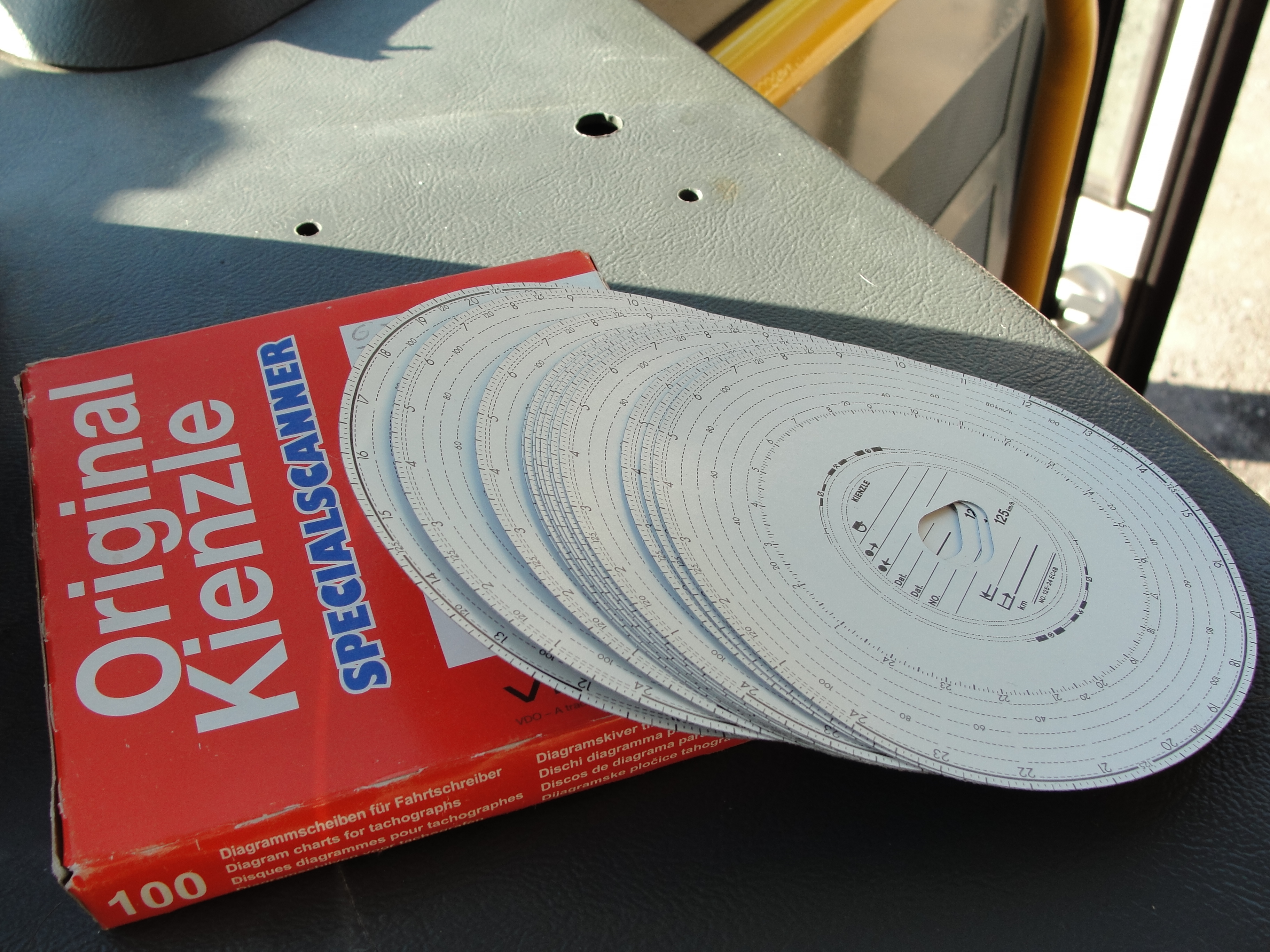 Disques chronotachygraphe Kienzle-VDO sortis de leur boîte.